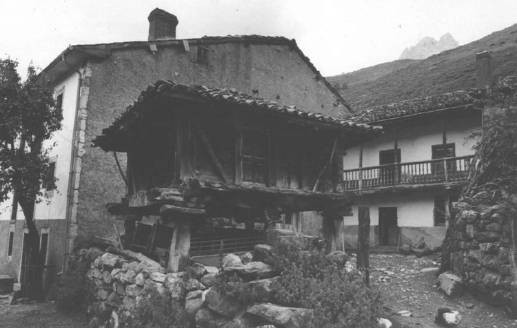 Arquitectura popular - Santa Marina de Valdeón (León) - Fotografía B/N